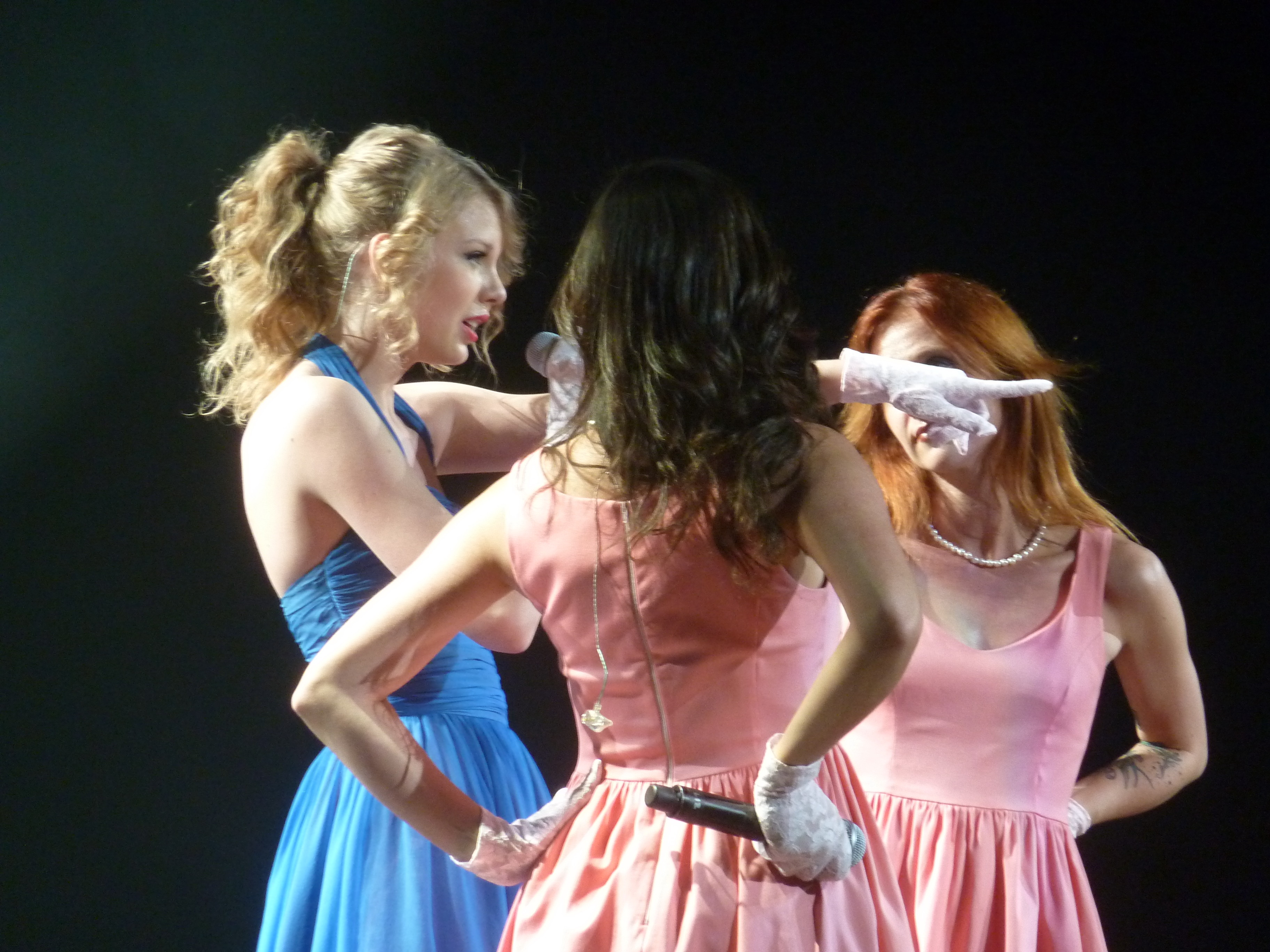 Taylor Swift en concert à Paris en Mars 2011